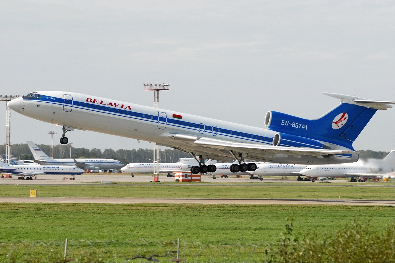 Belavia Tupolev Tu-154M